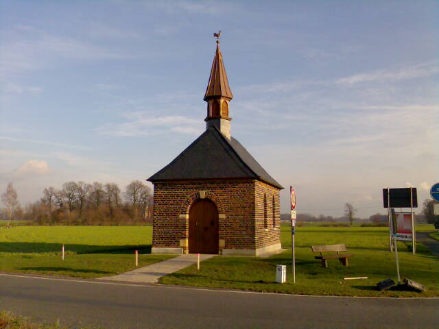 Kapelle in Hiddingsel, Deutschland